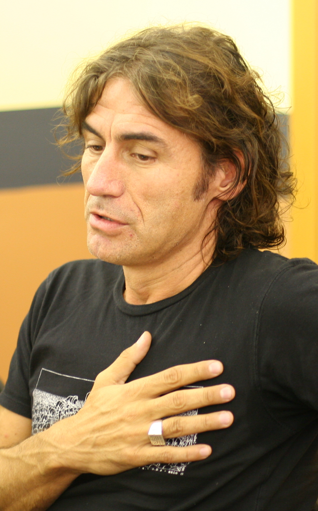 Luciano Ligabue a una conferenza stampa a Verona - Luciano Ligabue in a press conference in Verona